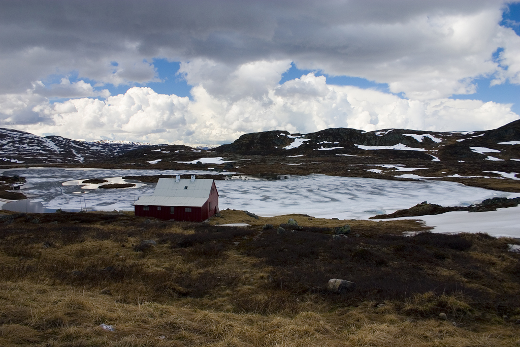 Dit is de Hardangervidda in het vroege voorjaar, deze foto is gemaakt door Rob Keuvelaar